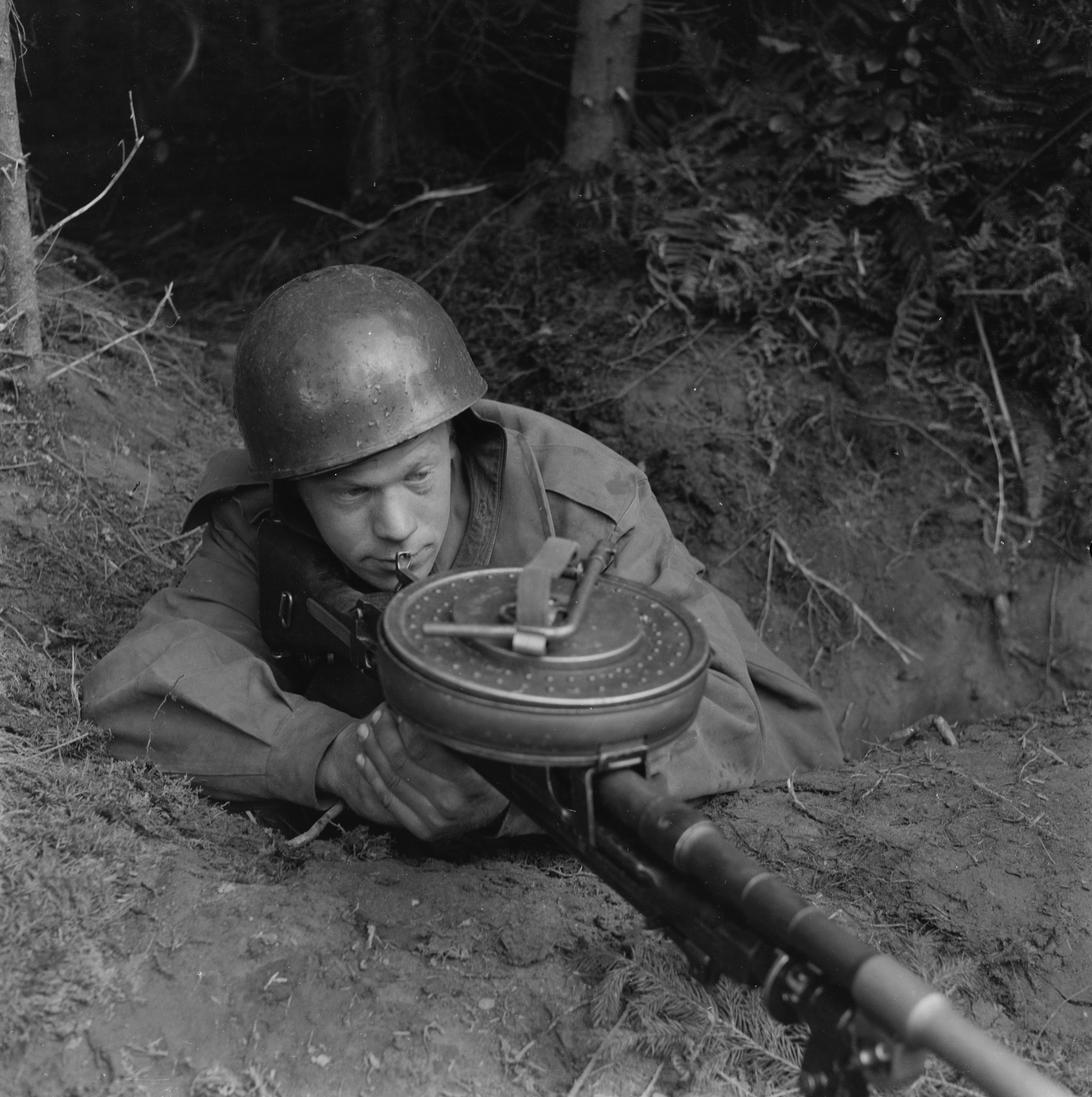 Bildet er hentet fra Arkivverket. Tysklandsbrigaden, øvelse Skandia III. NÅ nr. 20 Arkivinstitusjon : Riksarkivet Arkivnavn : Billedbladet NÅ Sted : Tyskland, Schleswig-Holstein, Ukjent, Ukjent Emneord: Soldat, Skytestilling, Våpen, Maskingevær, Øvelse Skandia, Tysklandsbrigaden, Gevær, Øvelse Skandia III, Automatgevær, Skyttergrav, Militærøvelse Avbildet